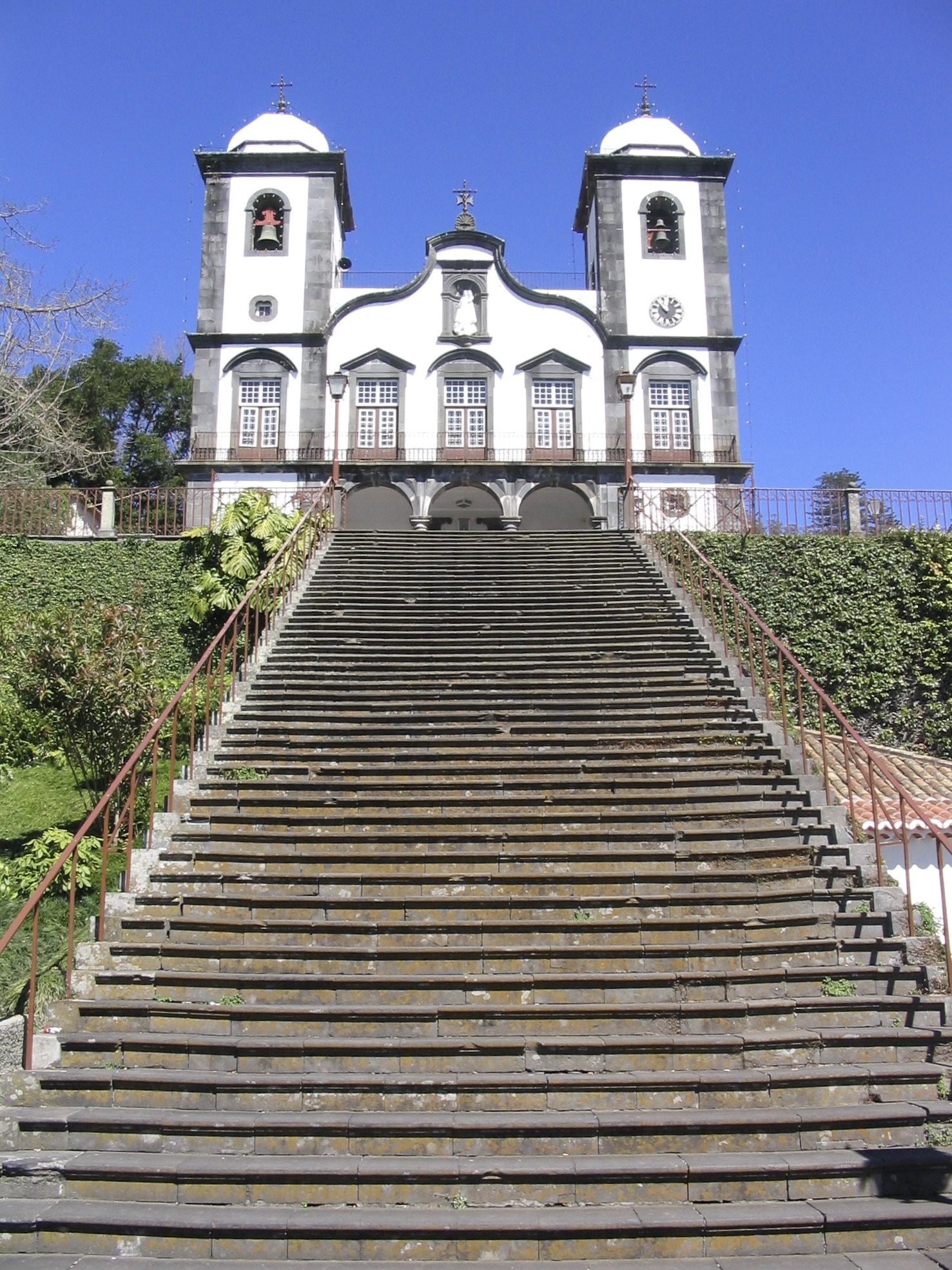 Igreja do Monte, Funchal, Madeira, Portugal.